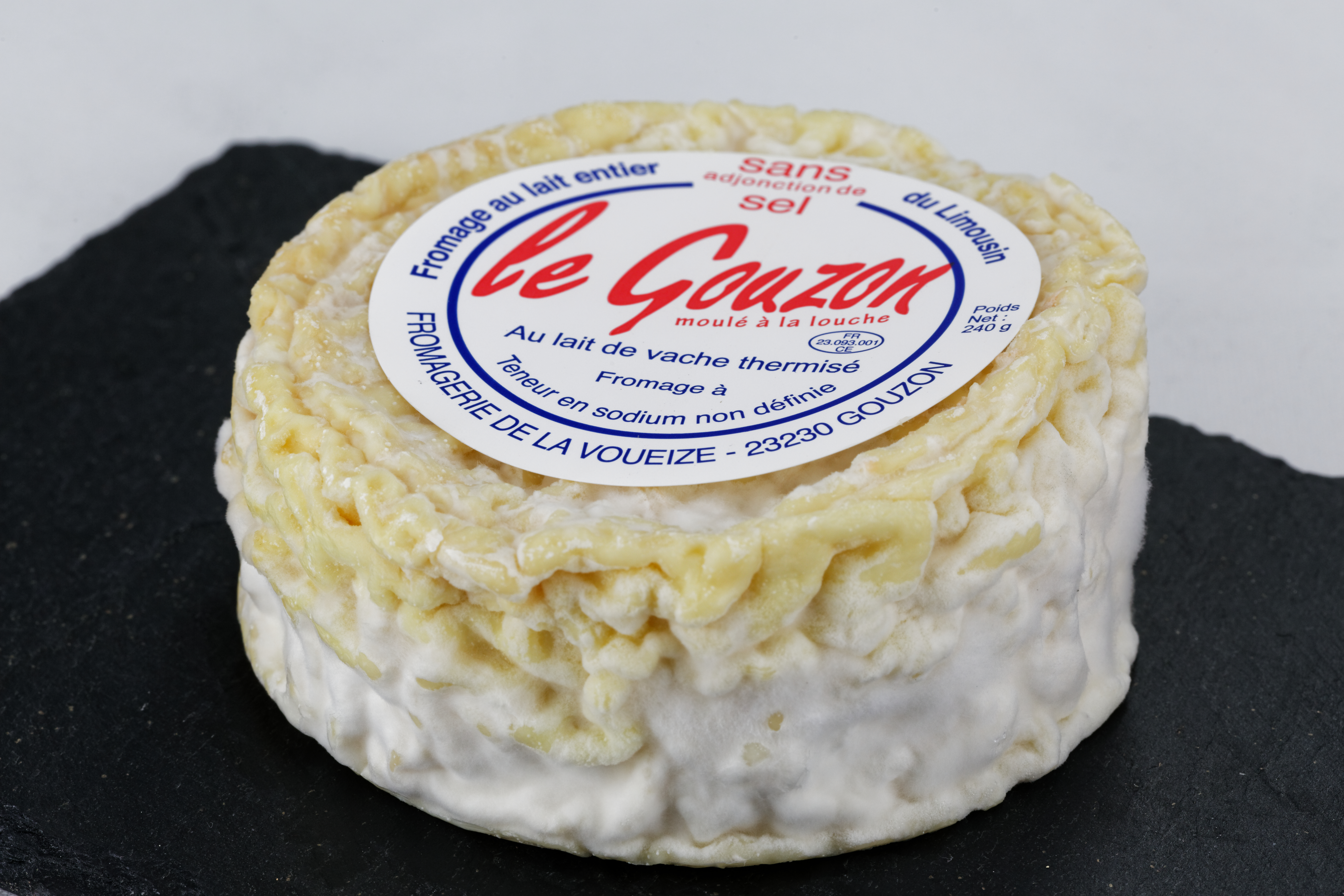 Le Gouzon est un fromage au lait de vache entier thermisé.